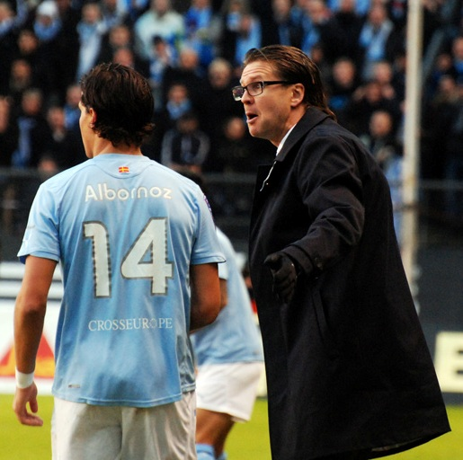 Miiko Albornoz y su técnico